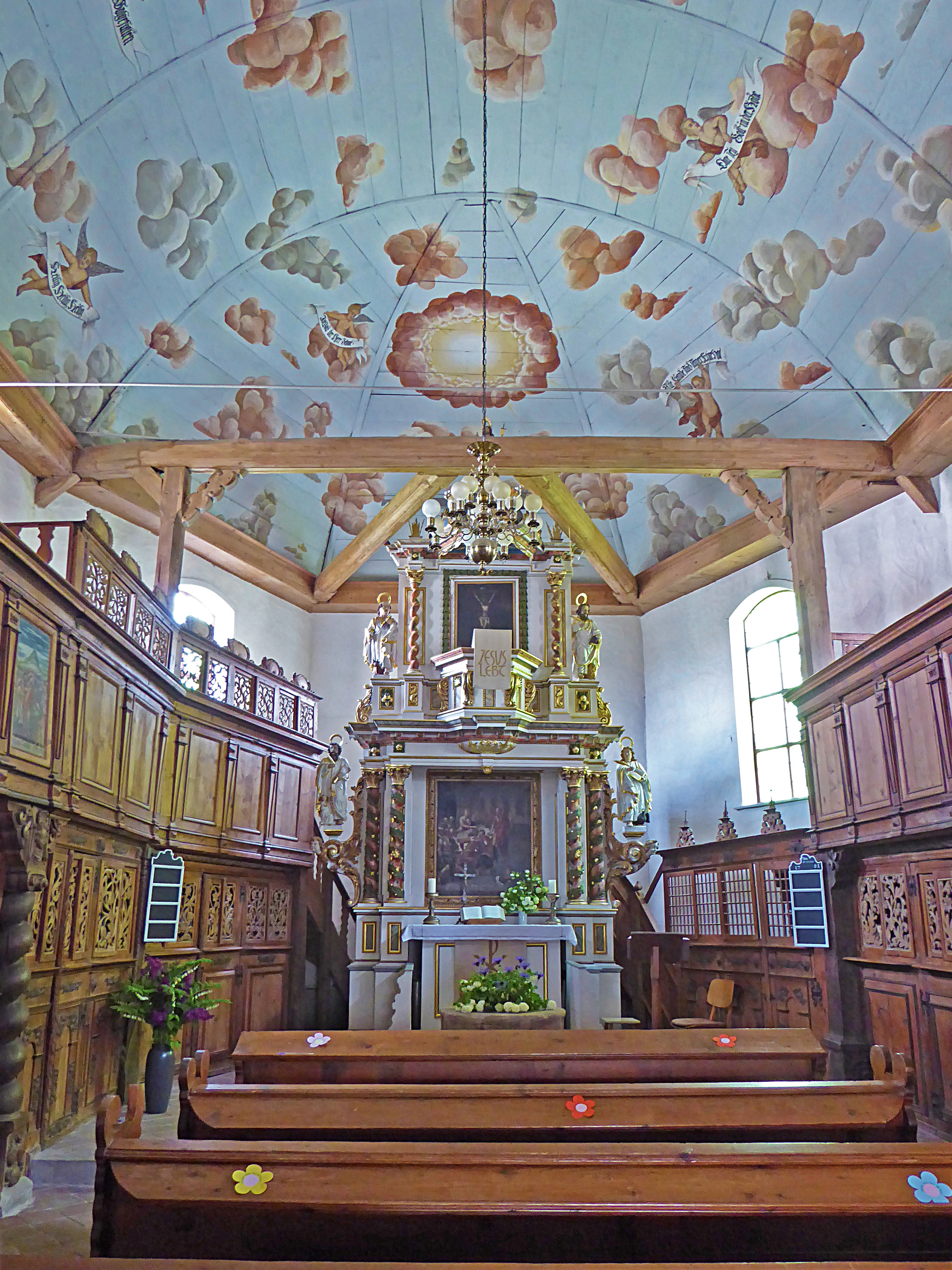 Trinitatiskirche (Hauröden)